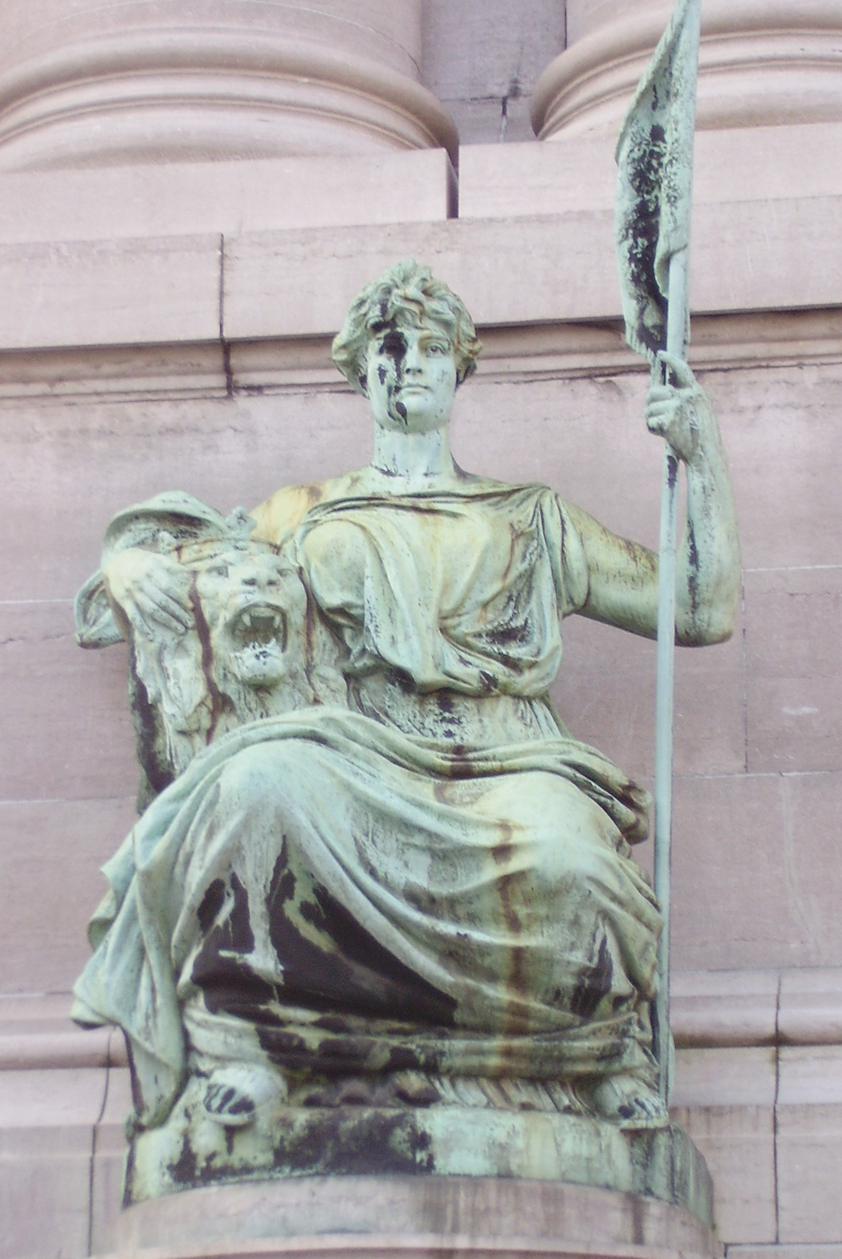 Arcades du Cinquantenaire, Bruxelles - Province de Flandre Orientale par Jef Lambeaux